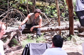 Carlos en una sesión de fotos en Miami, Fl, E.E.U.U